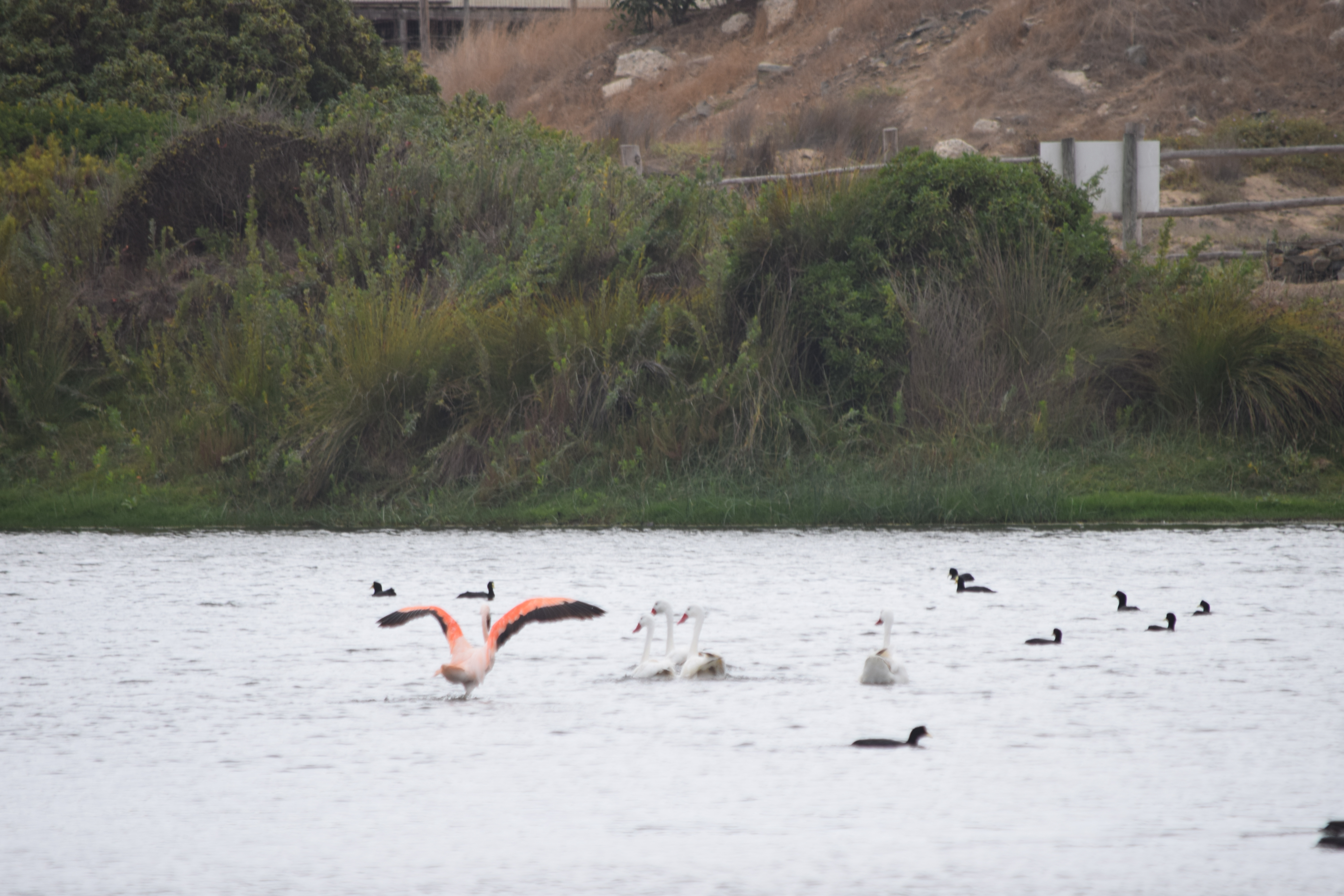 Flamenco chileno avistado en otoño de 2019 en el humedal de Los Molles. Se encontraba de paso y su visita duró cerca de dos semanas, tiempo en el que convivió con la fauna estable del humedal, para continuar luego su viaje hacia el sur.